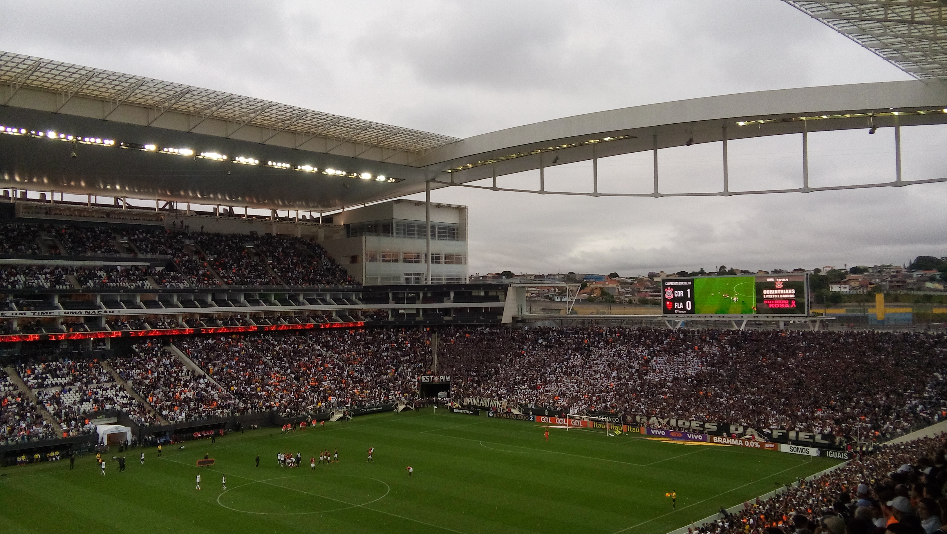 Clássico entre Corinthians x Flamengo, pelo Brasileirão 2015 na Arena do Timão!